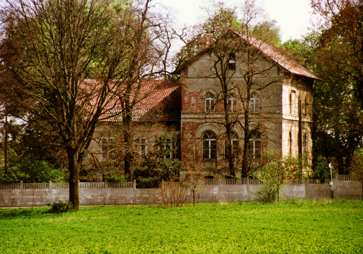 Dwór (siedziba rządcy) w Karłowicach. Foto: Stanisław Nowak, Poznań, Poland.